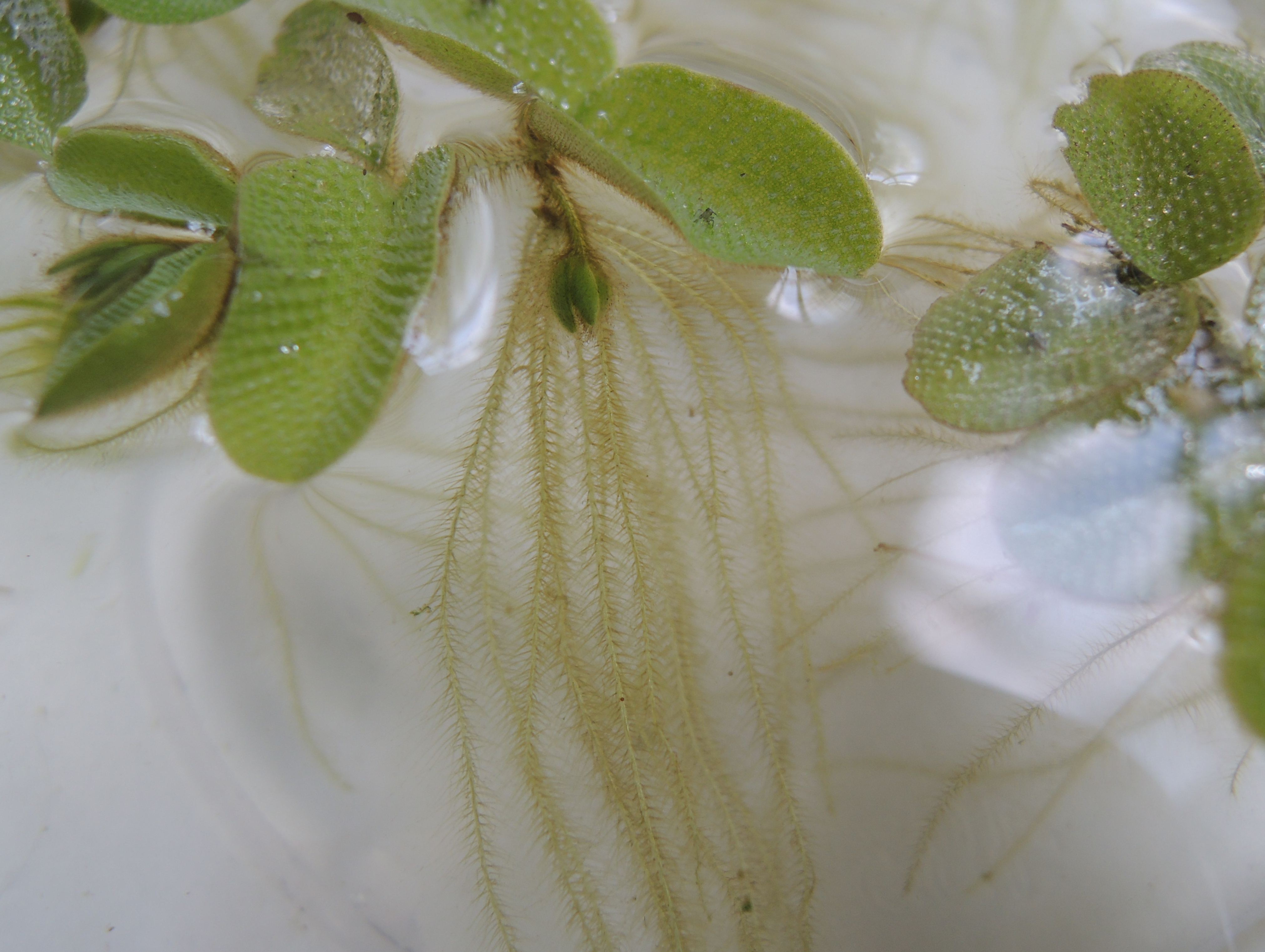 Занурена вайя сальвінії плаваючої